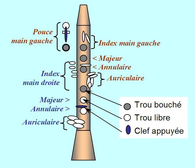 disposition des doigts et convention de notation de la tablature. Exemple donné: Fa #(4) doigtéfourche